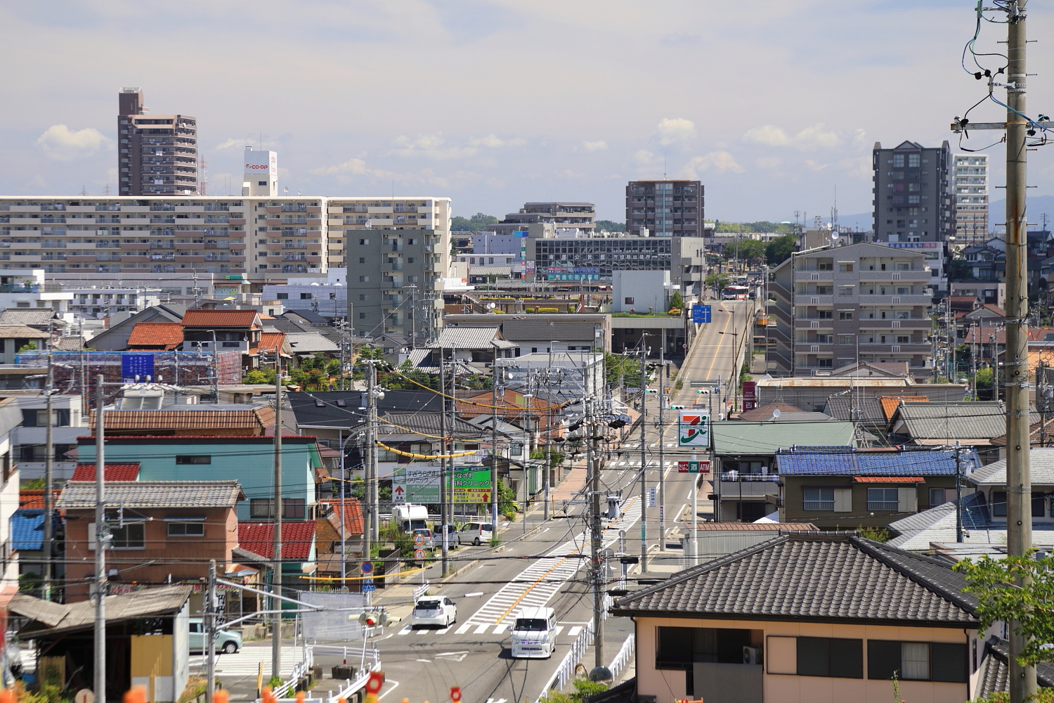 内山から望む前後駅周辺（豊明市栄町、2018年（平成30年）7月）